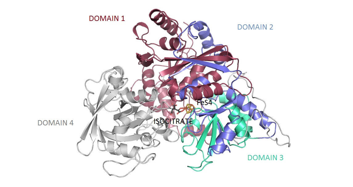 Ilustración de aconitasa (cerdo) con isocitrato como complejo y FeS4 como grupo ambos ilustrado en esferas. Estructura secundaria coloreada por dominio (dominio 1: rojo, dominio 2: azul, dominio 3: verde, dominio 4: gris).